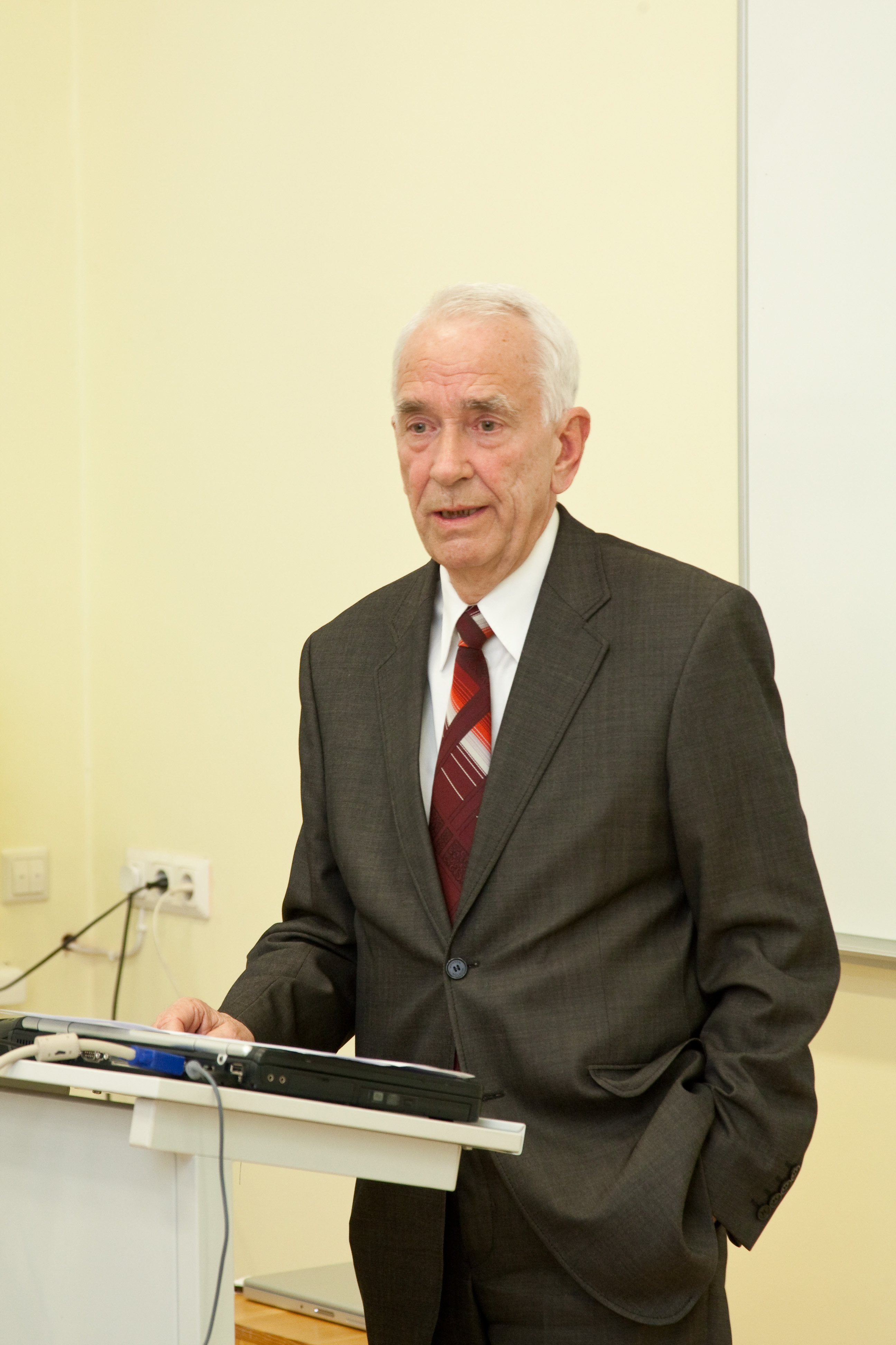 TÜ emeriitprofessor Ain-Elmar Kaasik 6. märtsil 2009 toimunud TÜ närvikliiniku lahkumispeol L. Puusepa 2 hoonest L. Puusepa 8 asuvasse uude korpusesse.